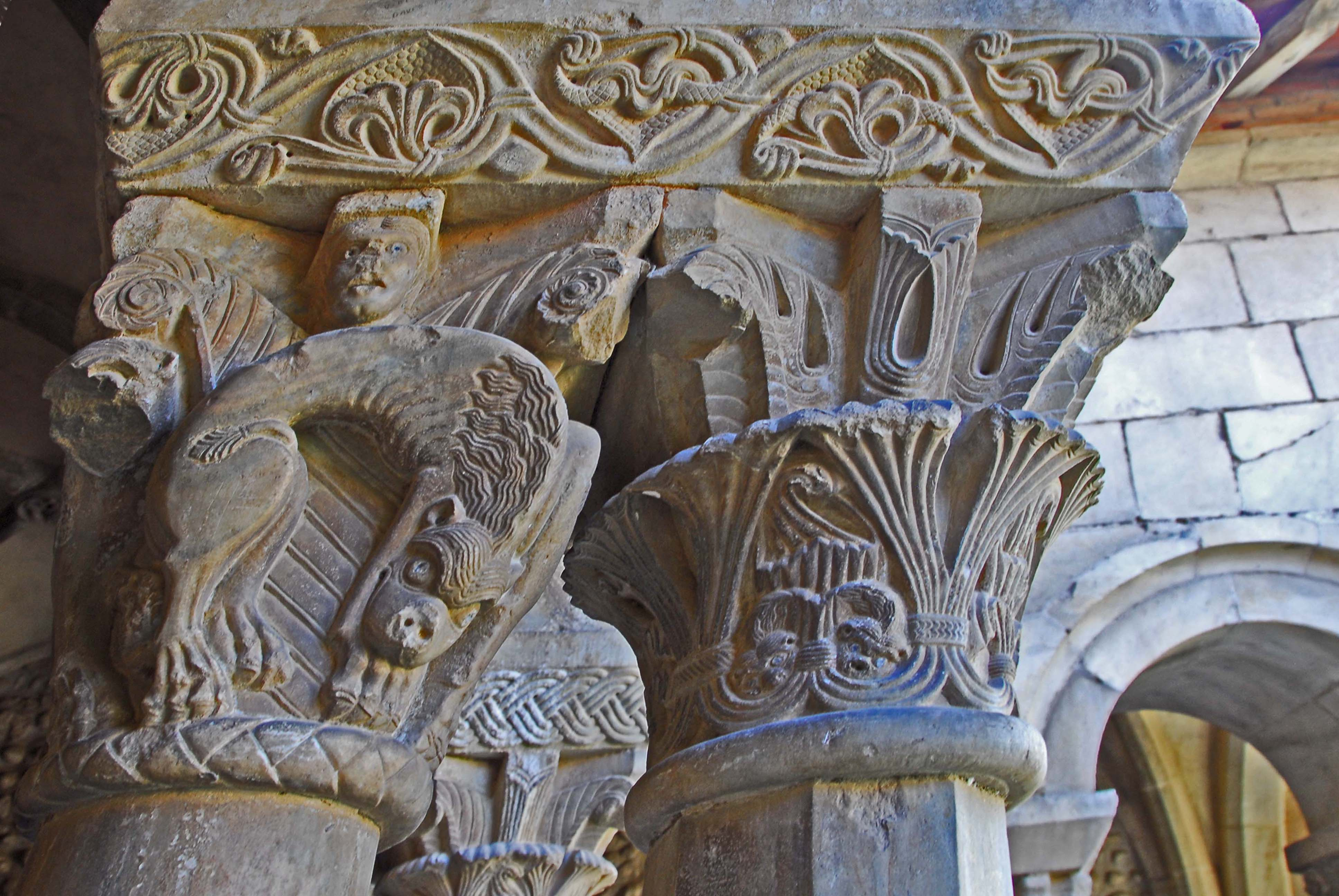 Ste-Eulalie-et-Ste-Julie_d’Elne, Säulenkapitelle Südgalerie, genbogener Löwe u. Pflanzen